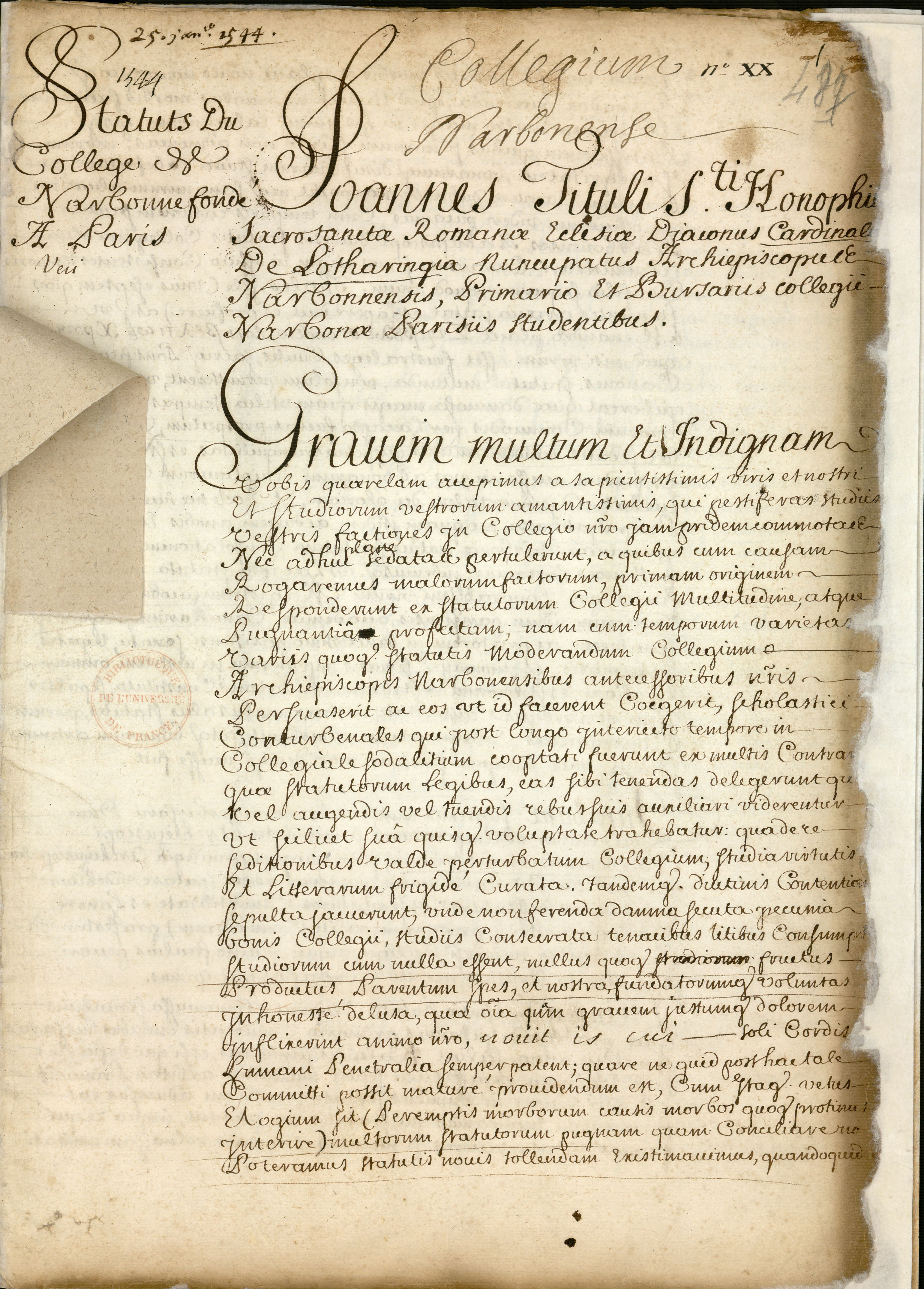 Manuscrit en latin, dans un registre de 738 feuillets consacré aux fondations et statuts des collèges.